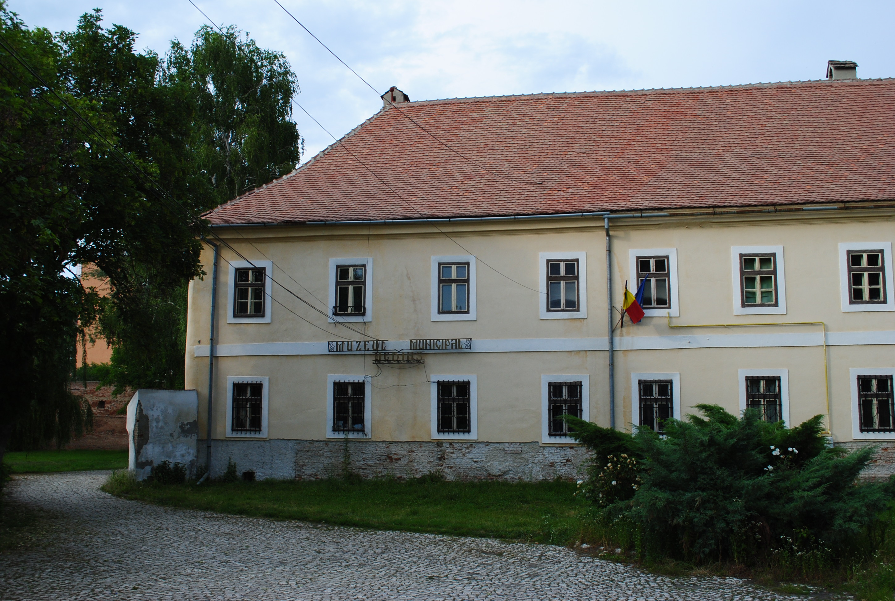 Claustrul fostei mănăstiri franciscane, azi Muzeul Municipal, 1490 - 1515,1726 - 1733 02